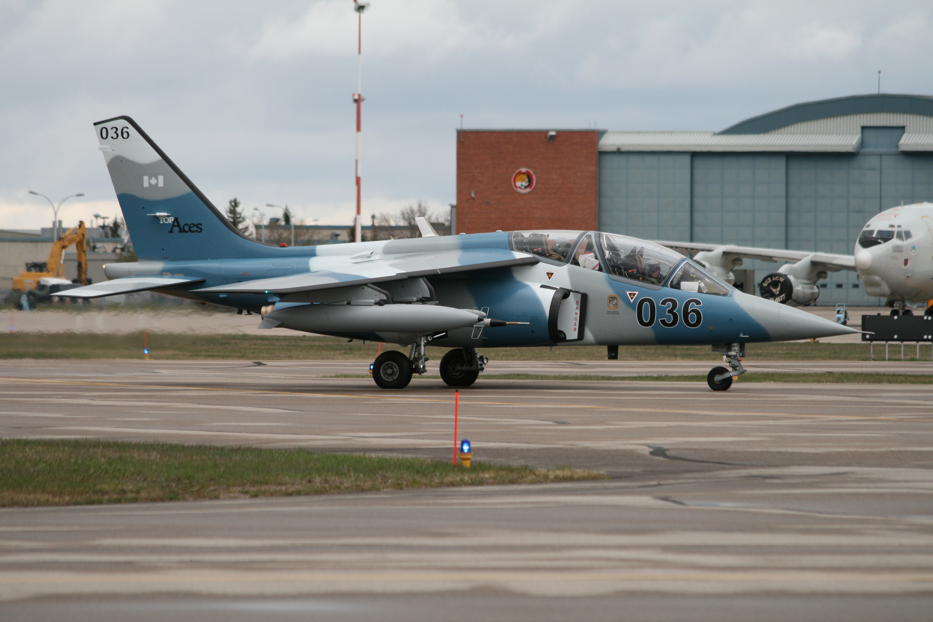 Alpha Jet